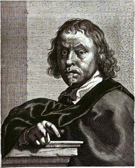 Portrait of Cornelis van Poelenburch